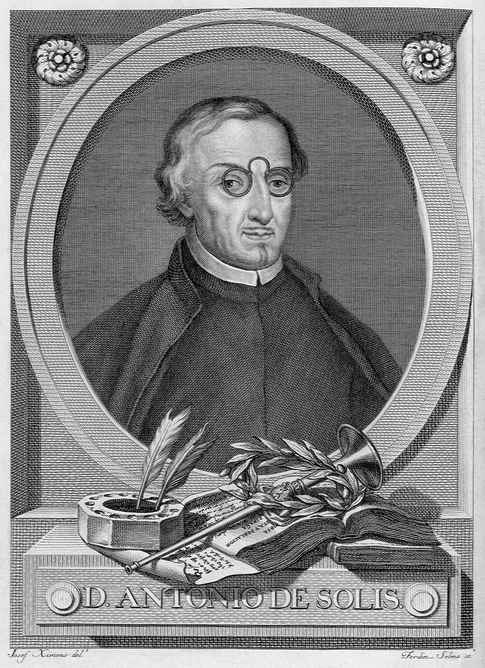 Grabado con la imagen de Antonio de Solís, en el libro Historia de la conquista de México. Grabado por José Antonio Ximeno y Carrera y Fernando Selma. Impreso en Madrid por Antonio de Sancha en 1783.